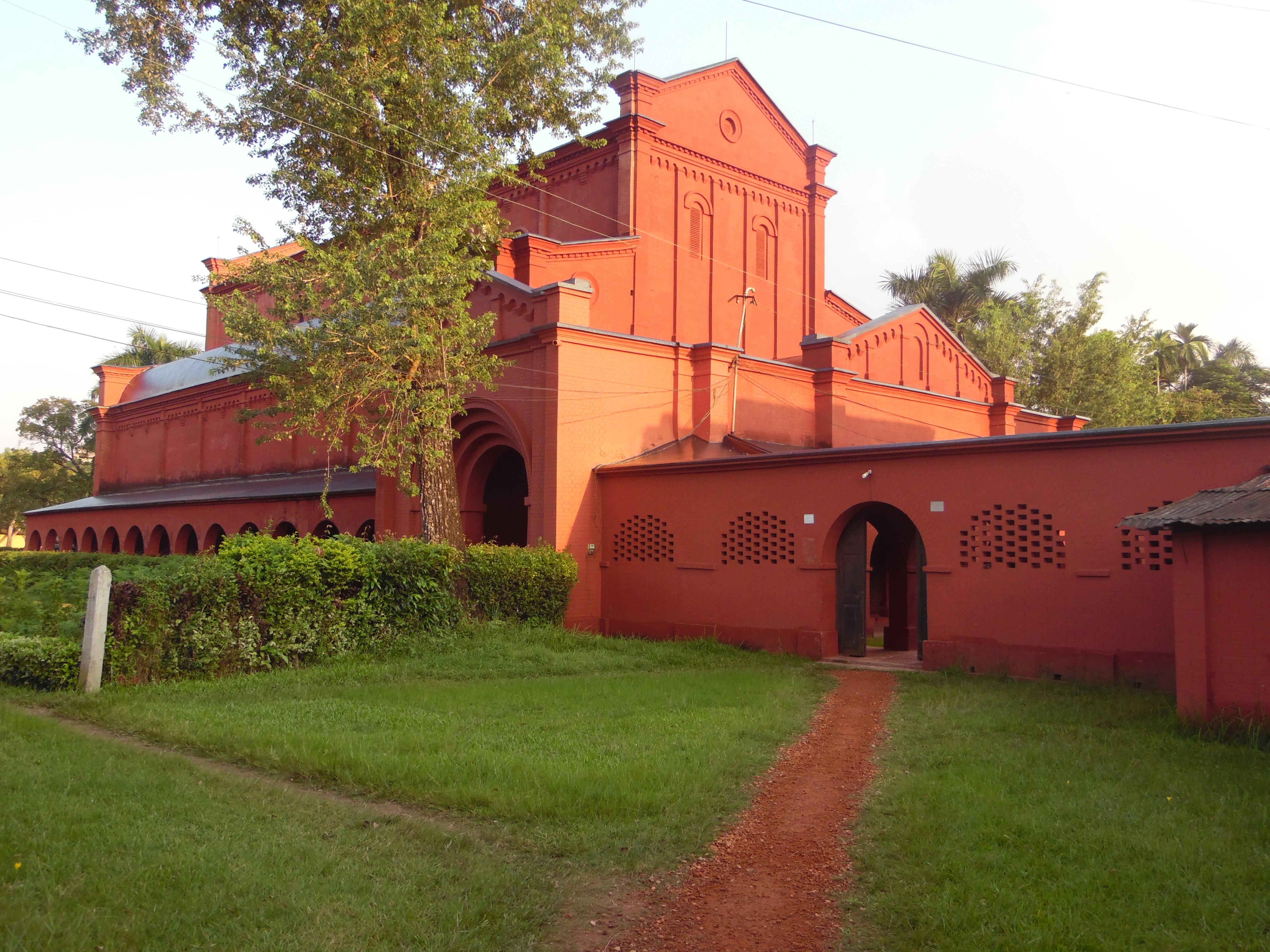 অক্সফোর্ড মিশন গির্জা